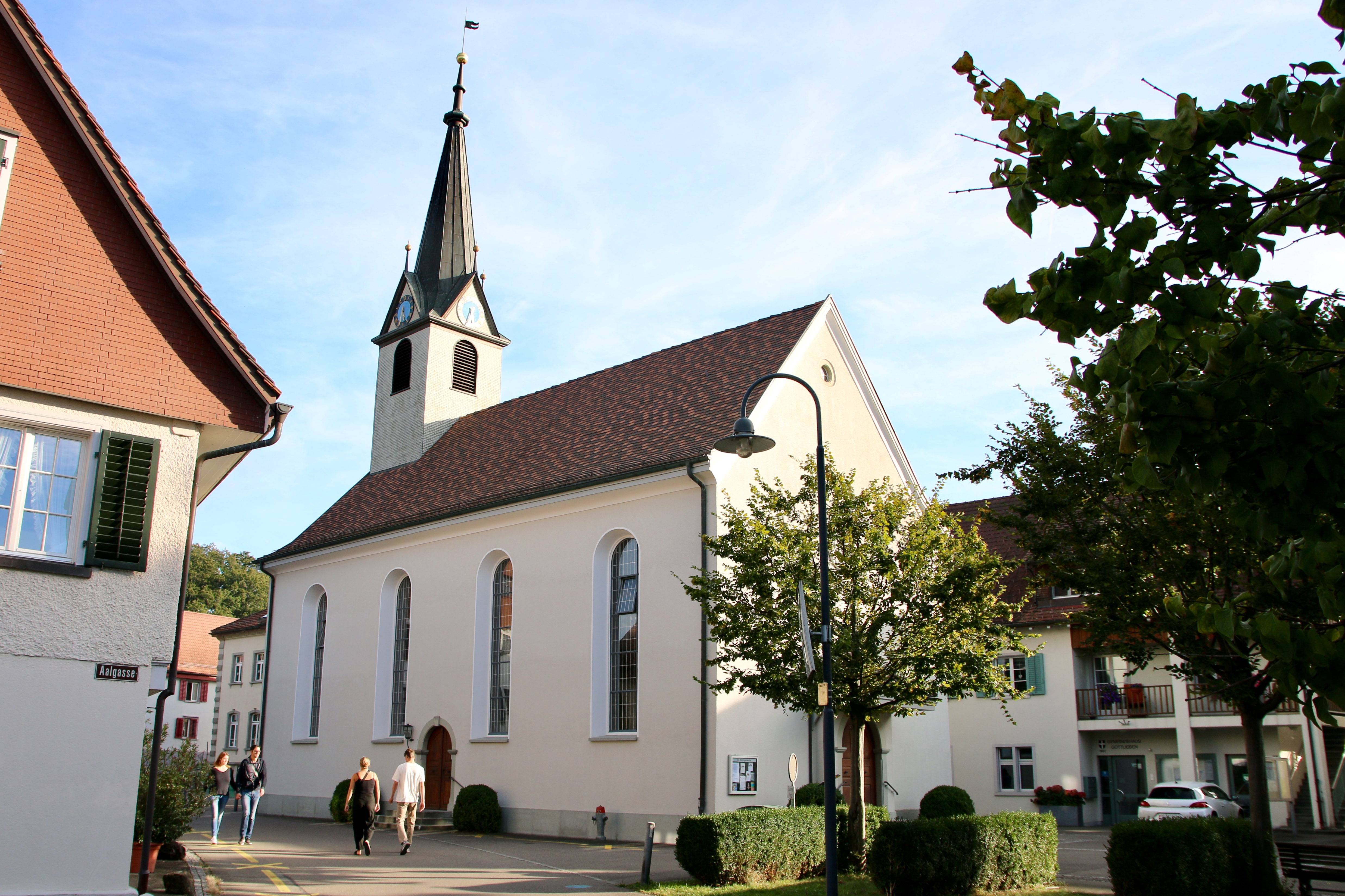 Die evangelische Kirche in Gottlieben